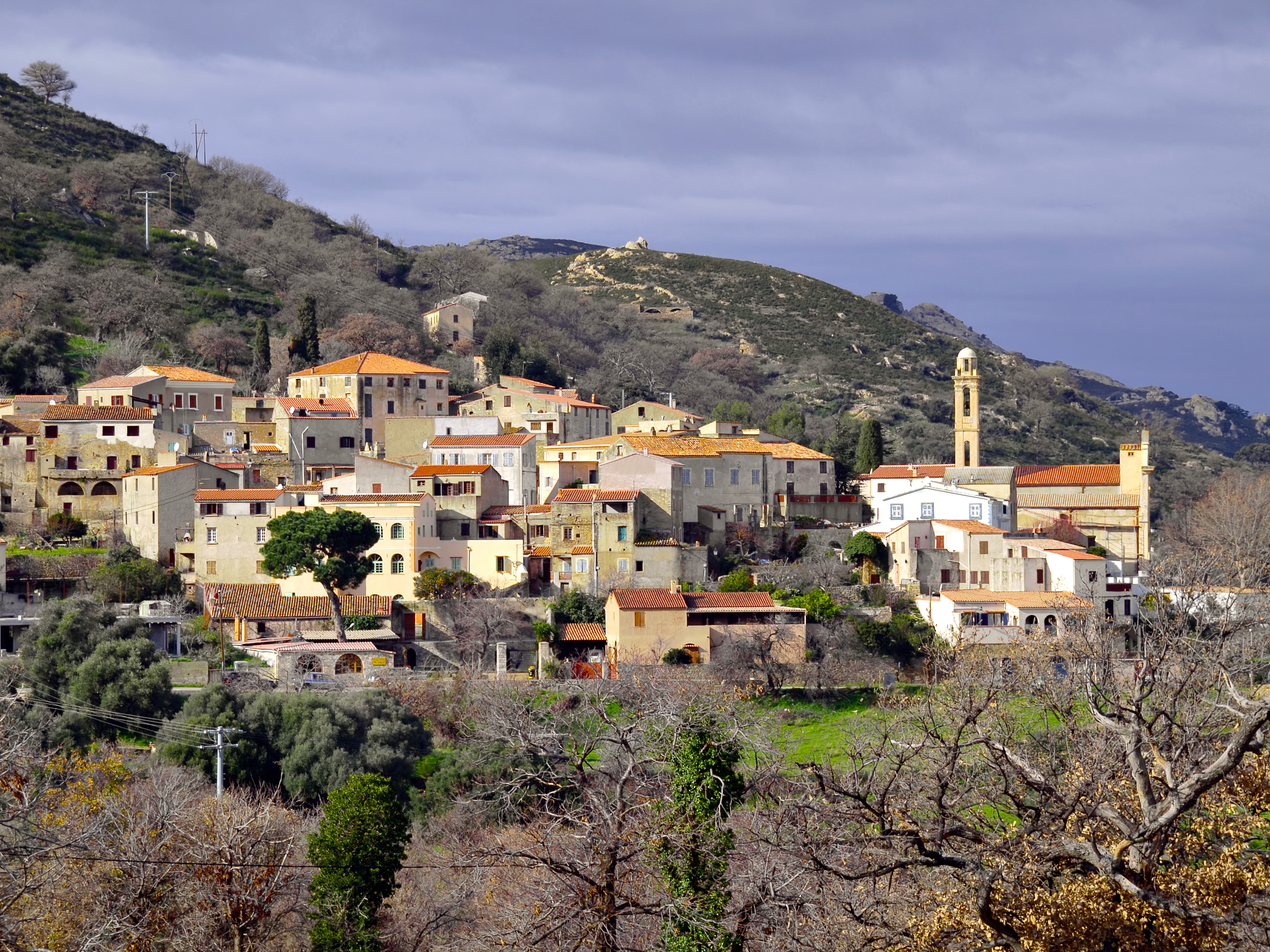 Lavatoggio - Village